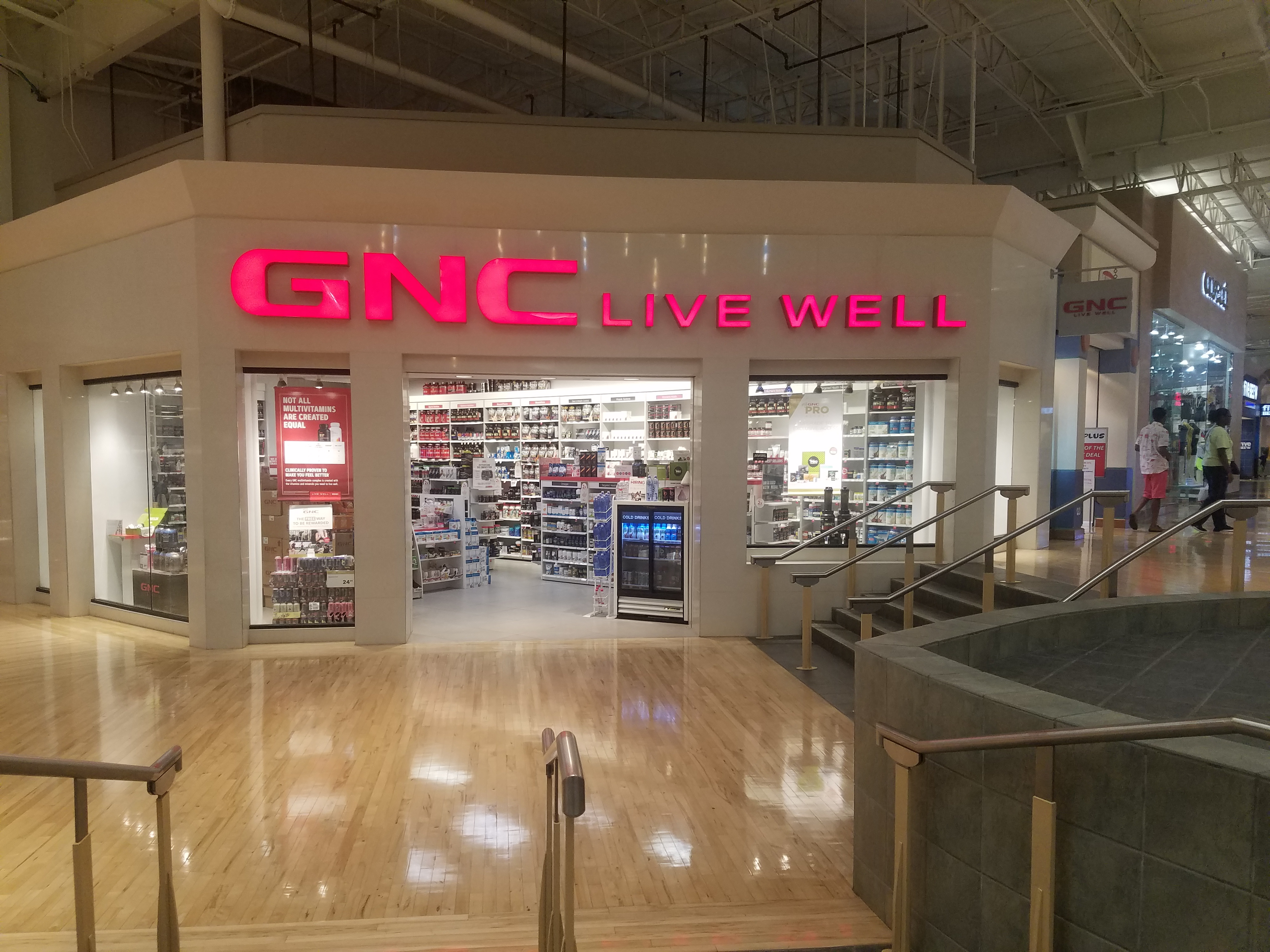 Woodbridge, VA